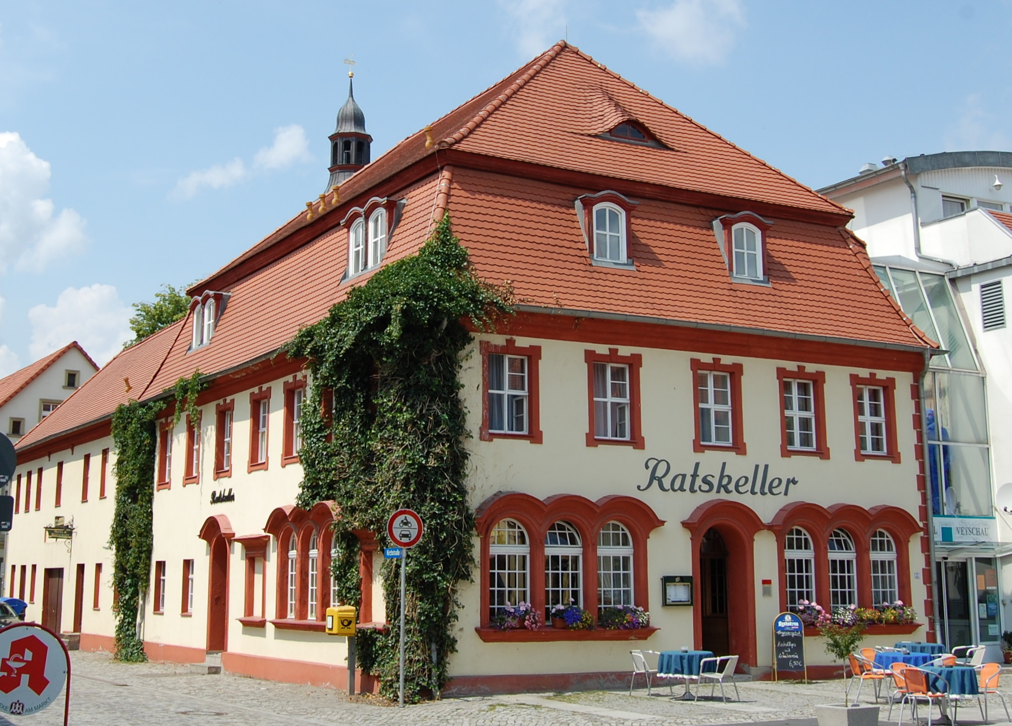 Ratskeller Vetschau